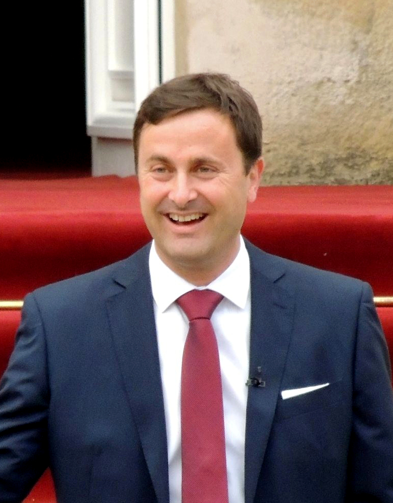 De Xavier Bettel, 2012.